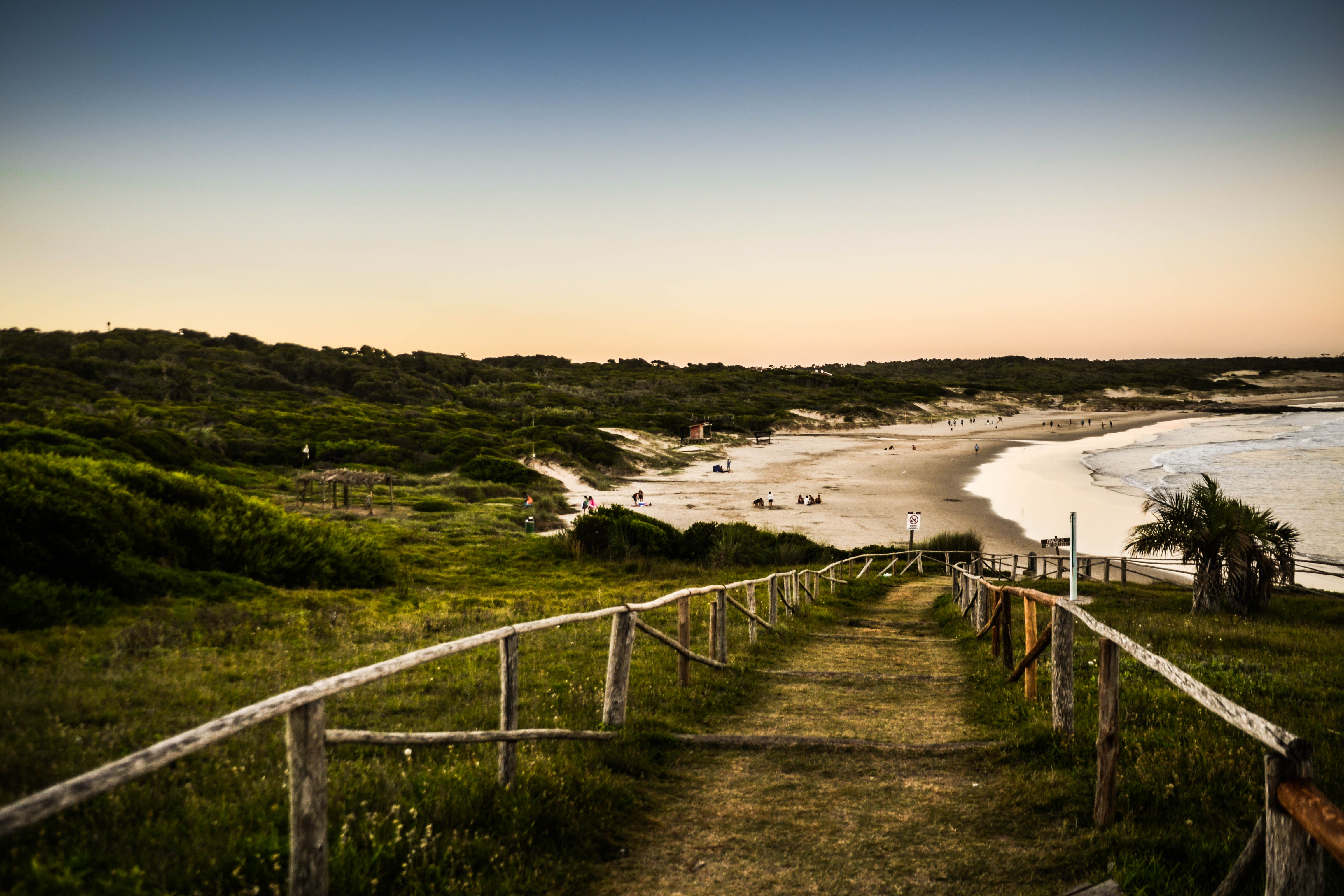 En la Reserva Natural de Santa Teresa una de las playas más populares y visitadas por los veraneantes es la Playa La Moza, siendo la playa más al norte y prácticamente en la frontera con la Coronilla. Le debe su nombre a que hace unos cuantos años atrás, naufragó en sus costas el cuerpo decapitado de una joven moza.